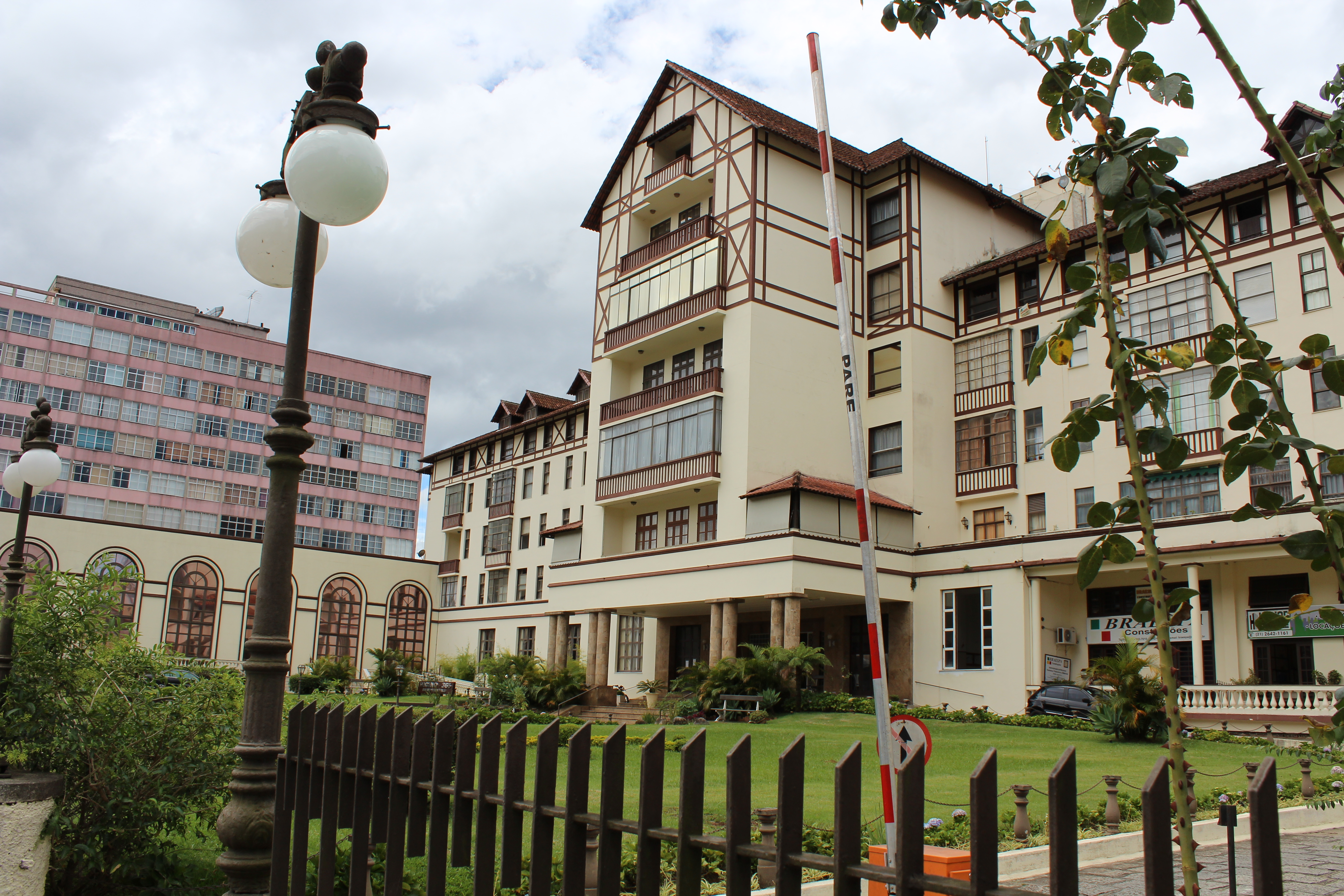 Fachada principal do Higino Palace Hotel, localizado em Teresópolis, interior do Rio de Janeiro.